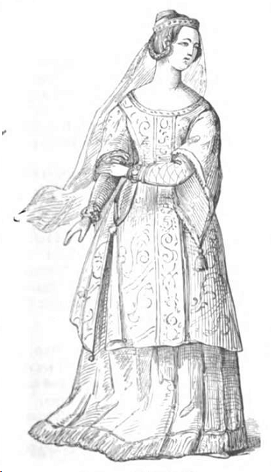 Irene – Fräul Wüst.